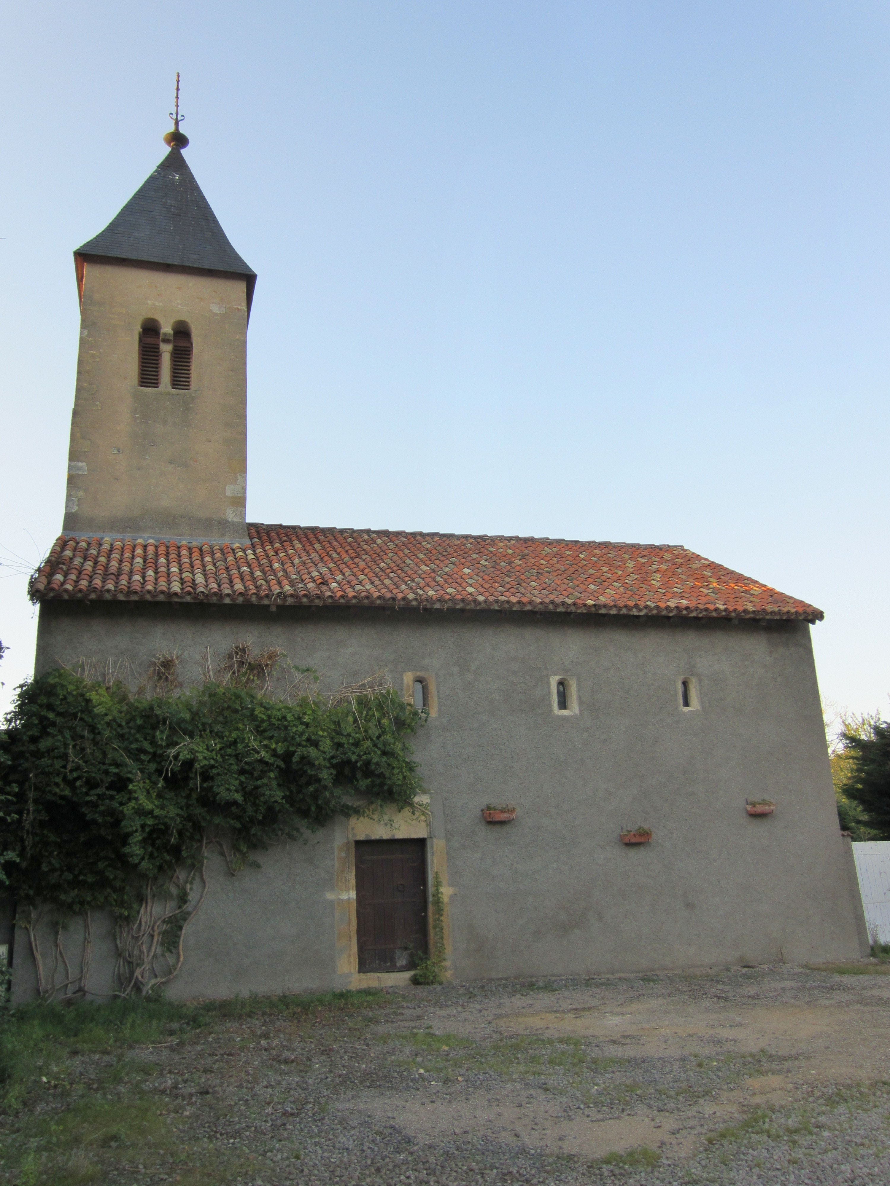 Description chapelle Vantoux Date30 September 2011SourceOwn workAuthorAimelaimePermission (Reusing this file) This building is en partie classé, en partie inscrit au titre des Monuments Historiques. chapelle Vantoux